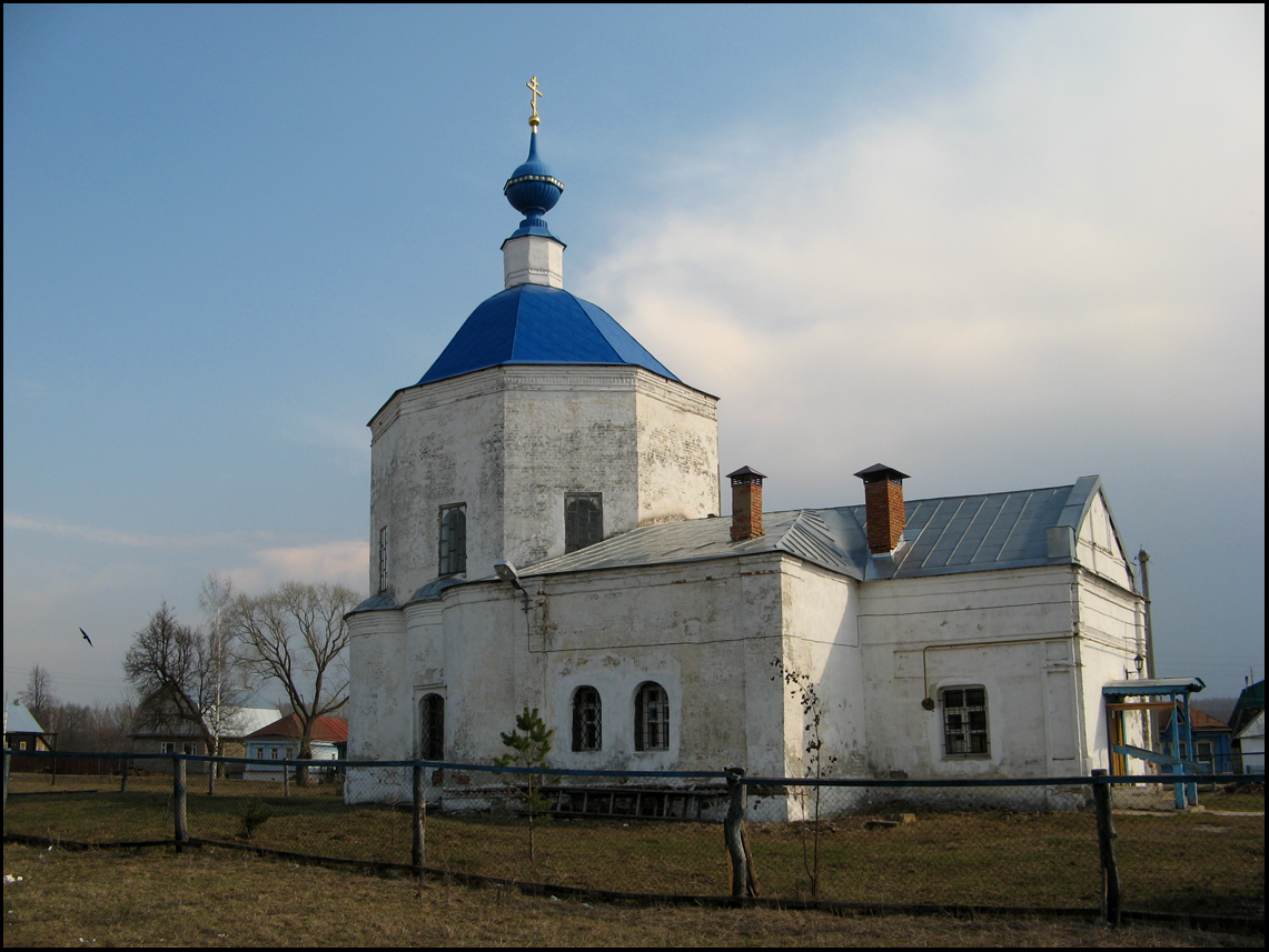 Суходол